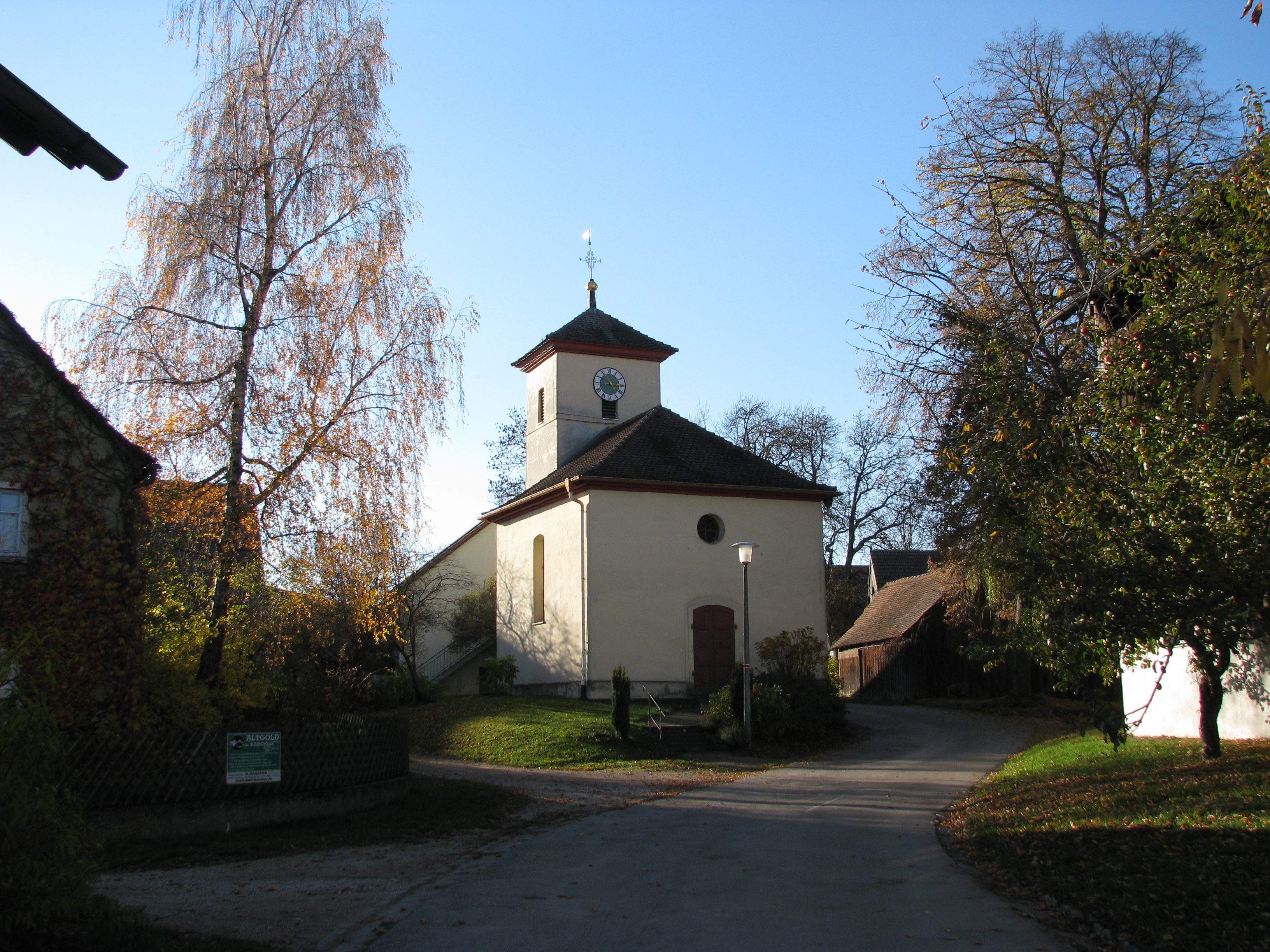 Reichersdorf, Ortsteil von Thalmässing im mittelfränkischen Landkreis Roth, St. Johannes-Baptist